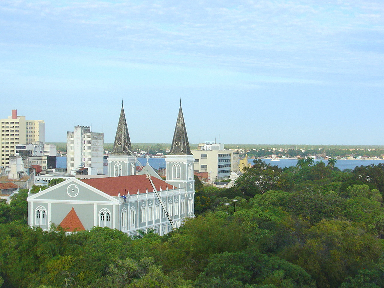 Parque Teófilo Dantas, que abriga a Metropolitana de Aracaju.